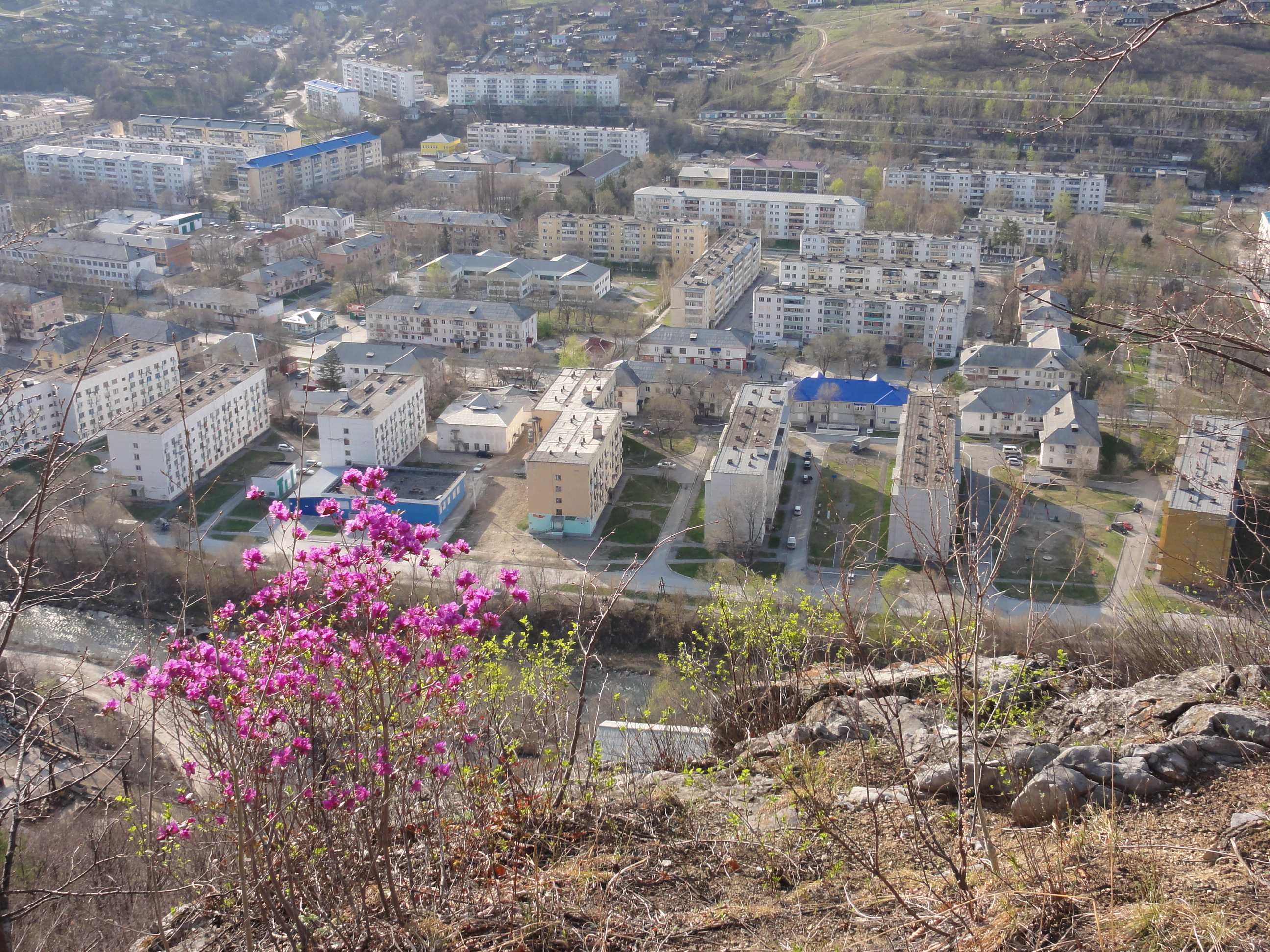 Центральный микрорайон Дальнегорска весной